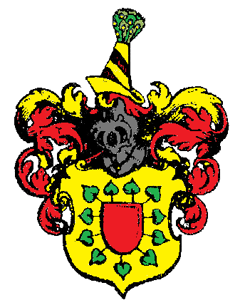 Wappen derer von Kniestedt, farblich optimiert, vereinzelt und daher heraldisch korrekt gespiegelt aus: Johann Siebmacher: New Wappenbuch, Tafel 170, Ritterschaft und Adel in Sachsen ("Sächsische")